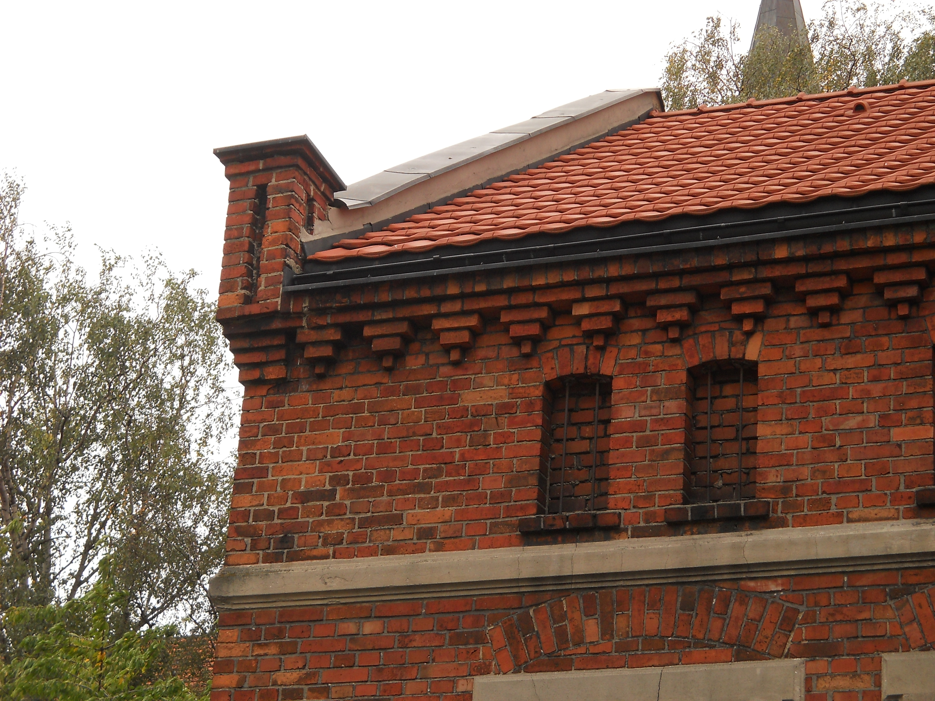 Pyskowice, ul. Poniatowskiego 10 - kościół parafialny pw. św. Mikołaja, plebania, Elementy architektoniczne (zabytek nr A/289/60 z 7.03.1960)